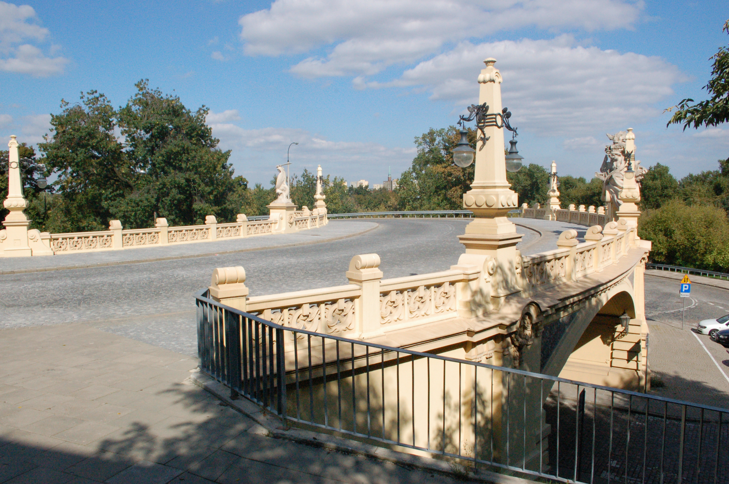 Warschau, Markiewicz-Viadukt in der Karowa-Strasse